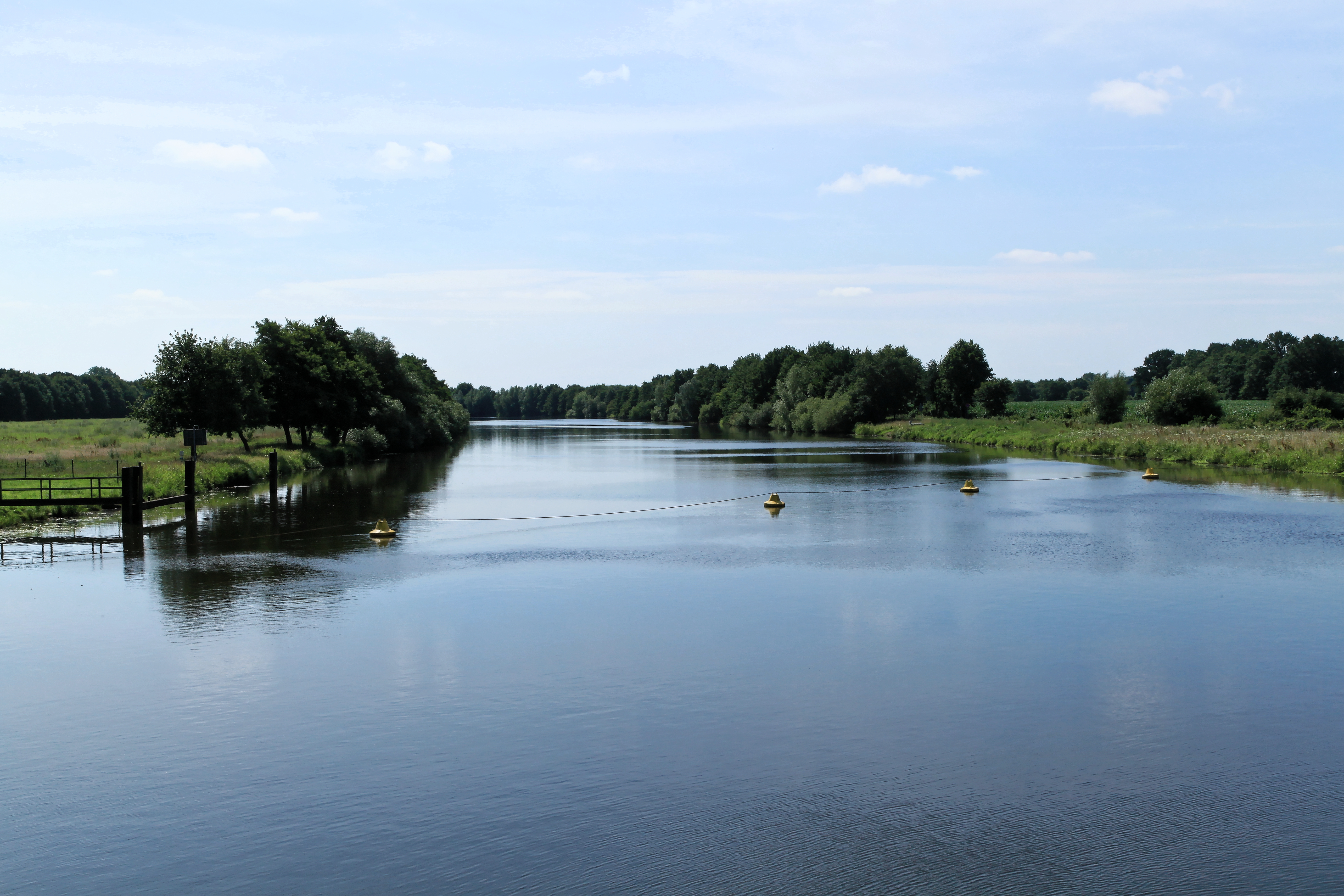 Blick von der Emsbrücke auf die Ems, Zum Wehr in Herbrum, Papenburg